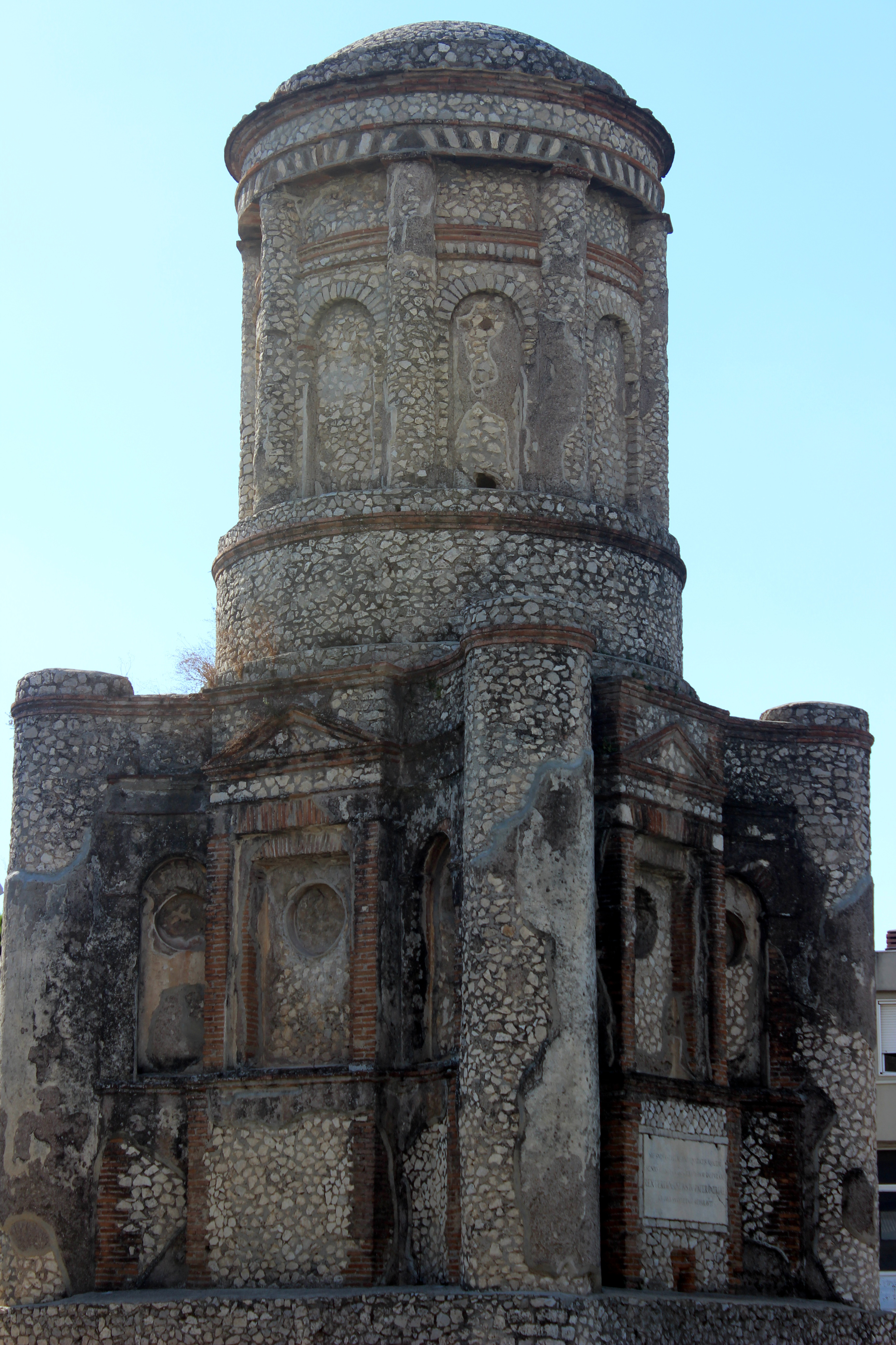 Santa Maria Capua Vetere. La Conocchia.